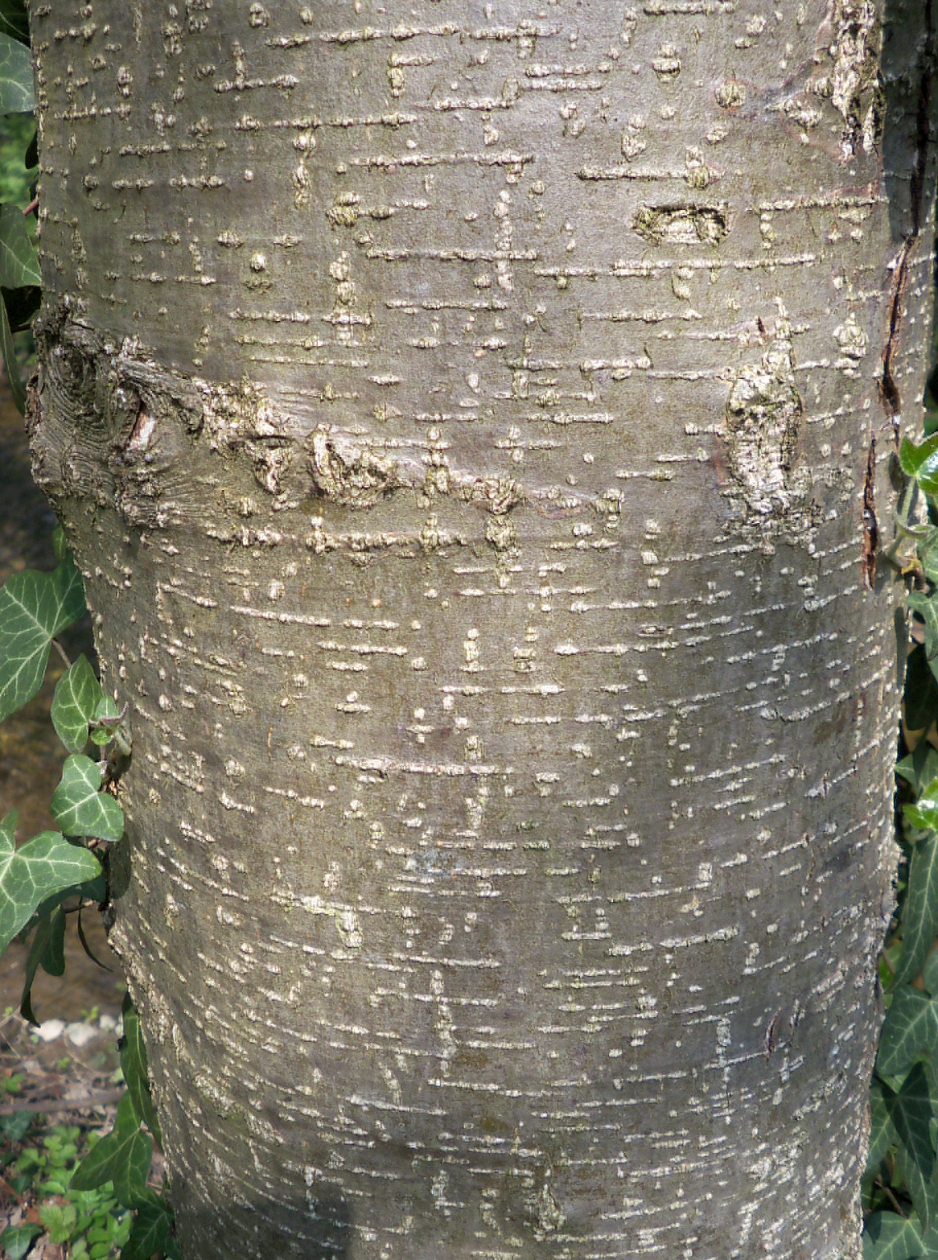 Corteccia giovanile di Alnus glutinosa